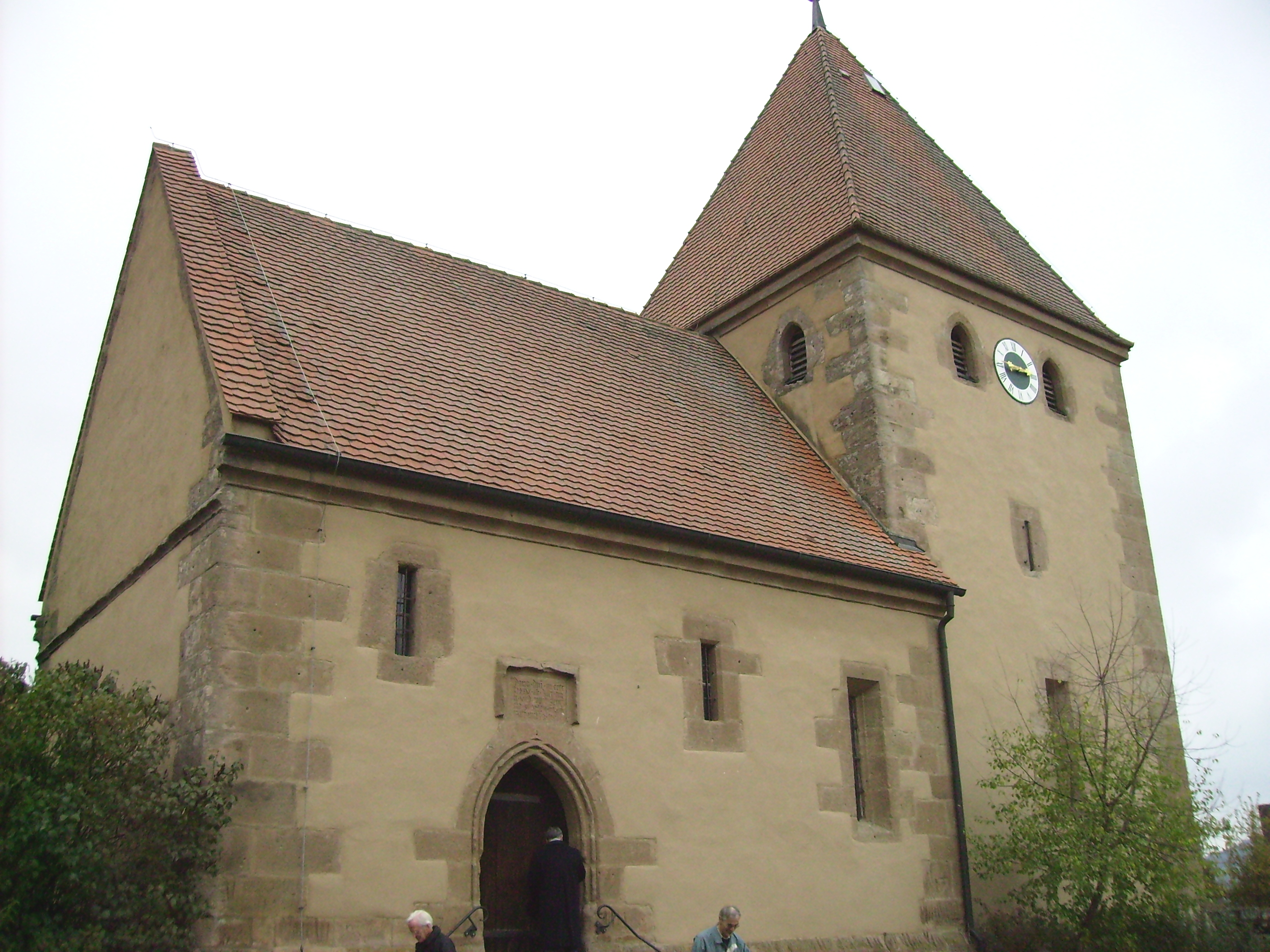 St. Nikolaus-Kirche Ruffenhofen am Hesselberg